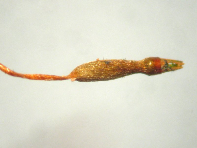 Durchscheinendes Georgsmoos Tetraphis pellucida, Sporogon (Seta + Kapsel), Rostock